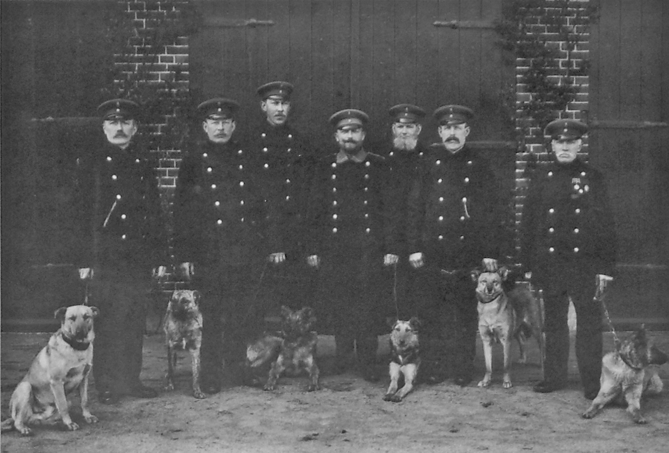 Die Uetersener Nachtwächter um 1905, von links: Klaus Schnack, Nägel, Roch, Ackermann, Brandt, von der Lieth, Johann Bols